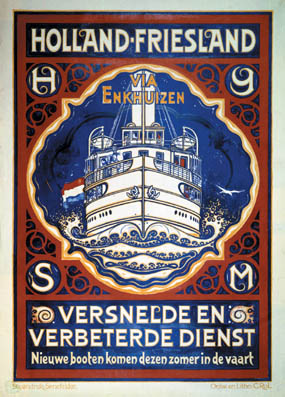 Affiche van de Holland-Friesland, later Reederij Stanfries